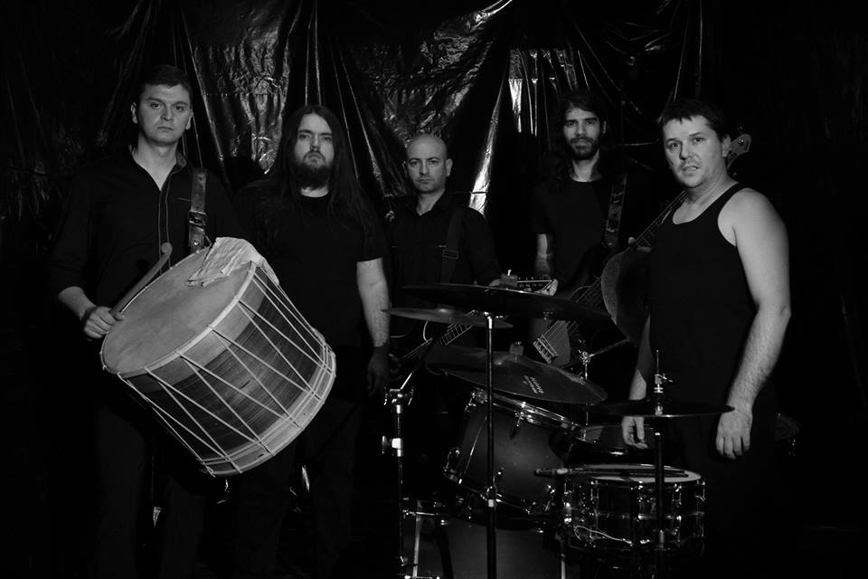 Новата постава на музичката група Верка - август 2014